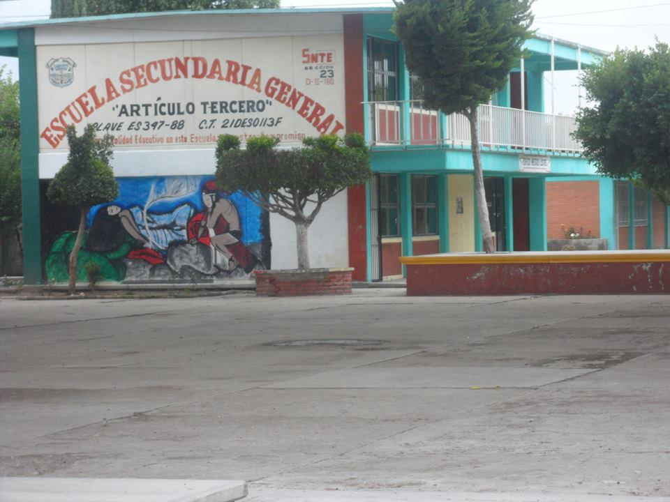 Escuela Secundaría Artículo Tercero, ubicada en 11 sur Núm. 4 de Palmarito Tochapán, Pue. Imparte la educación básica como tal (secundaría general), asimismo, está controlada bajo un control público (federal transferido).